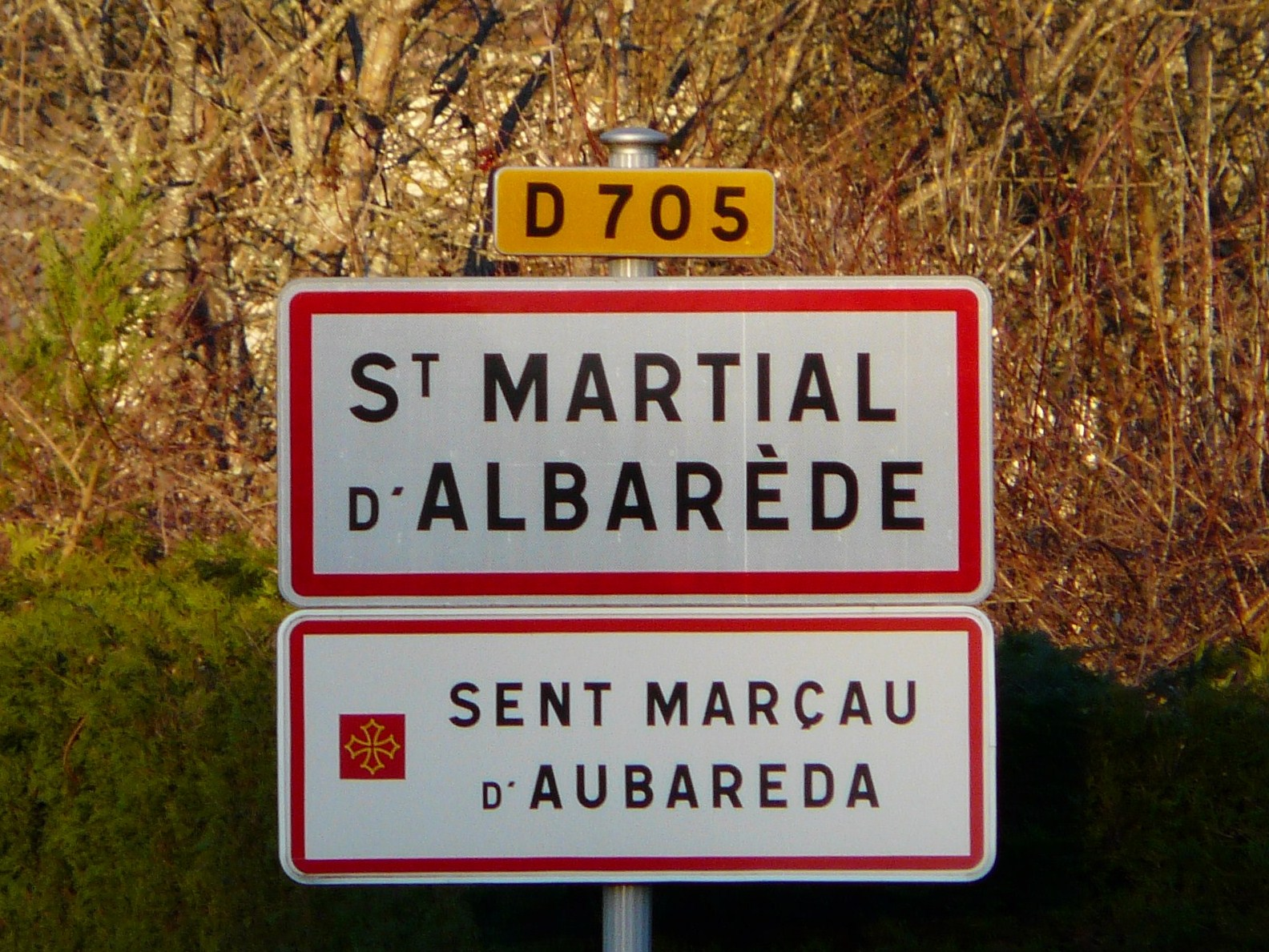 Panneau d'entrée (en français et occitan) dans le bourg, Saint-Martial-d'Albarède, Dordogne, France.